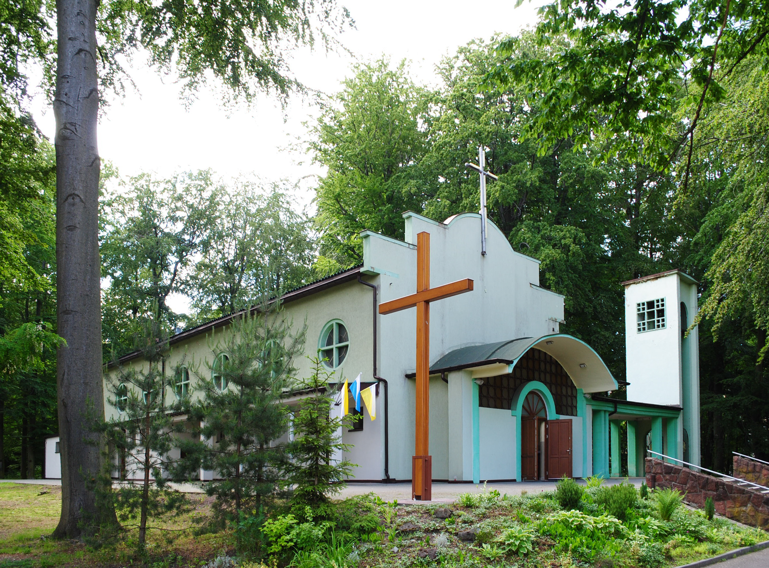 Katowice - Giszowiec. Ulica Górniczego Stanu. Kościół p.w. św. Stanisława Kostki